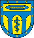 Wappen Großschweidnitz